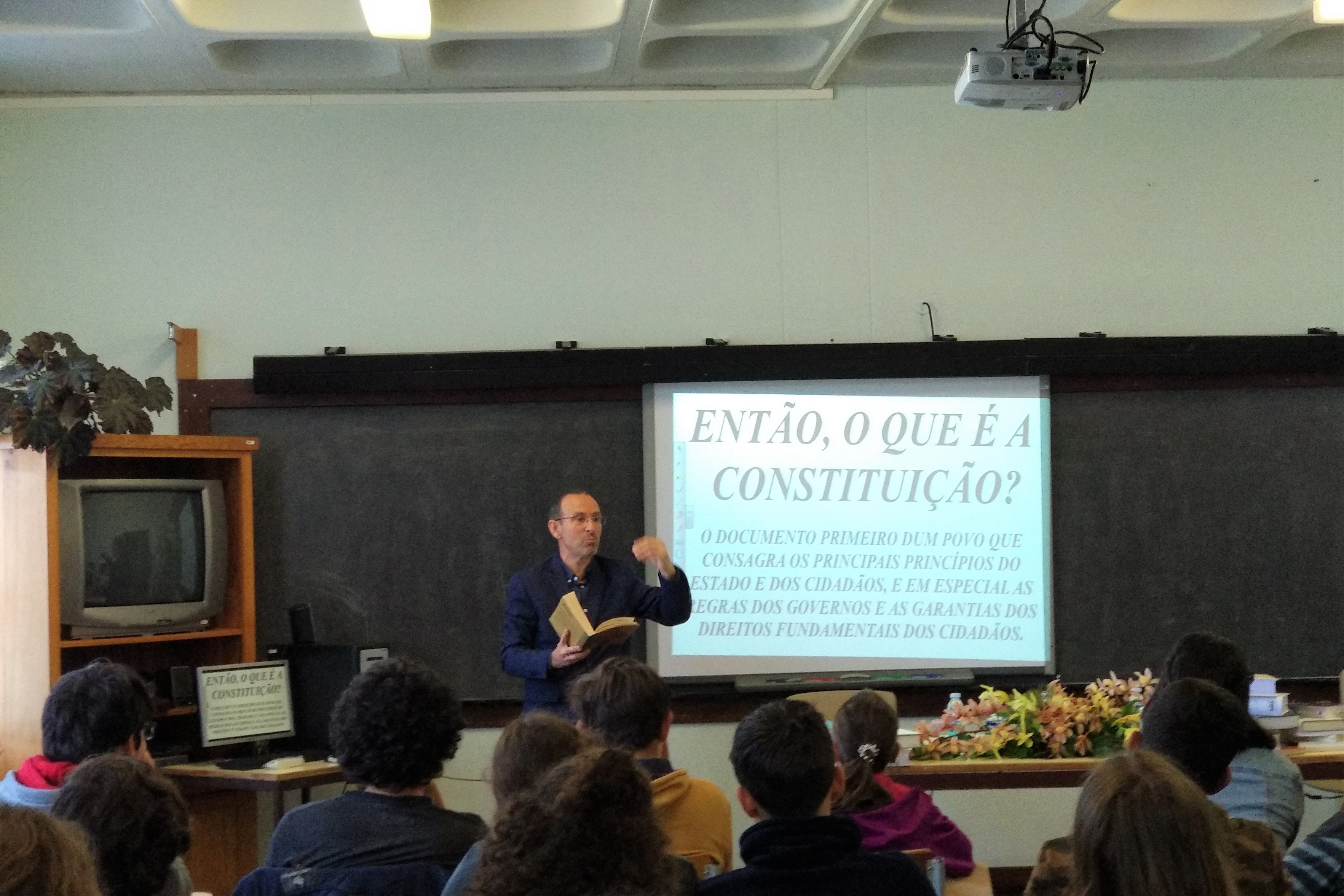 Arnaldo Ourique em curso sobre a Constituição Portuguesa na Escola Básica Integrada Biscoitos, 14 de maio de 2019.